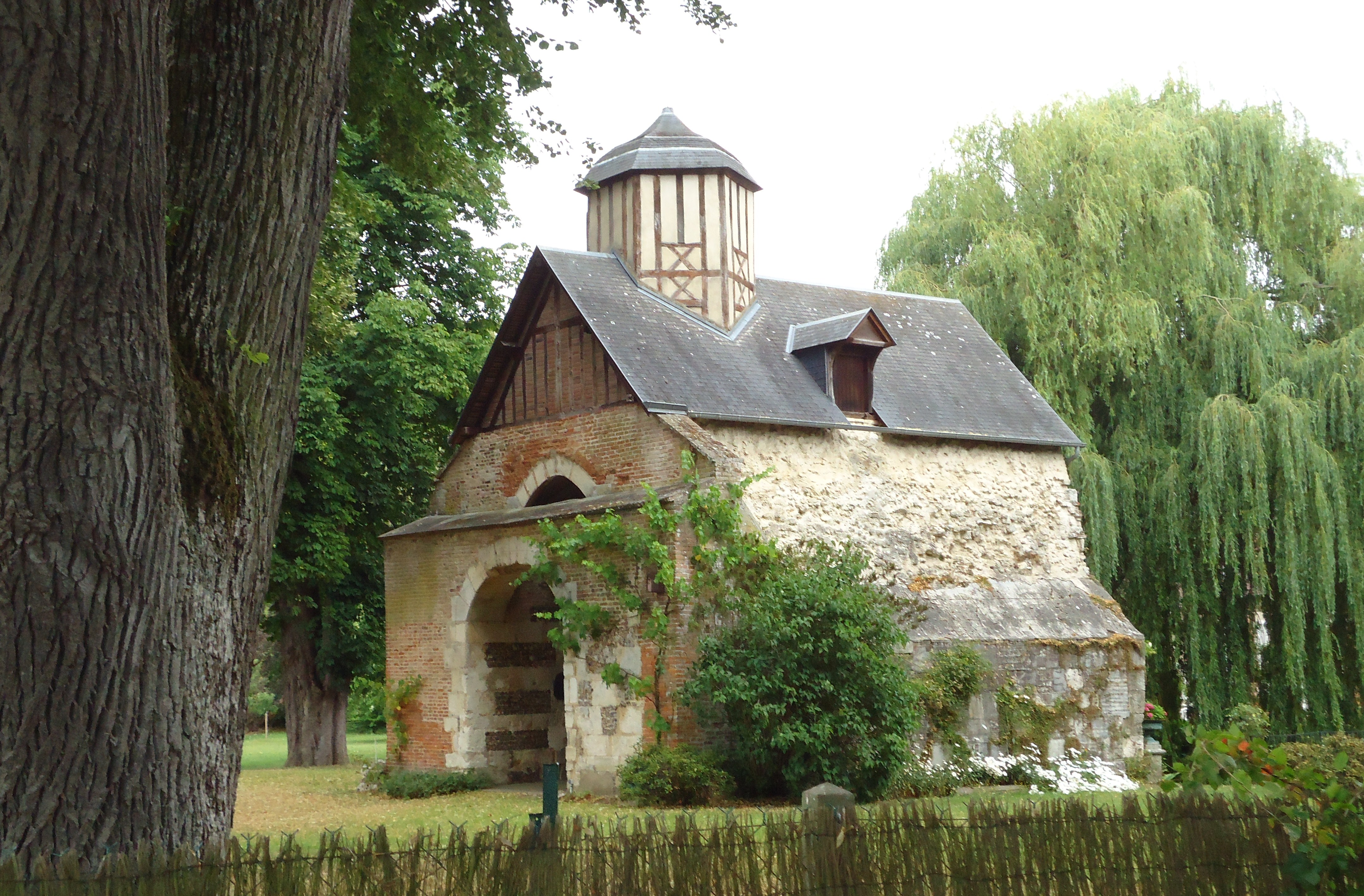 Poterne du château (ancien) - Normanville - Eure (27)